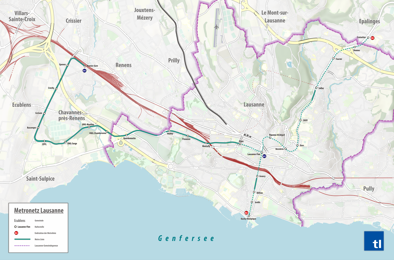 Metronetzplan des Transports publics de la région lausannoise (TL), ab 15. Dezember 2019